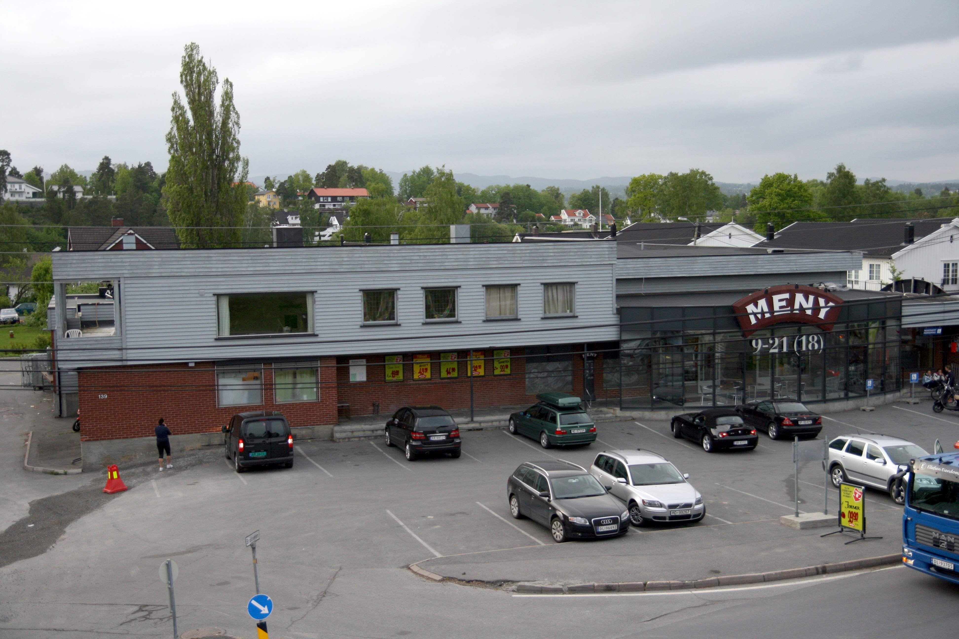 Meny på Snarøya.